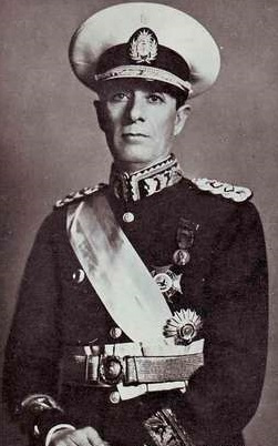 Tarjeta postal con el retrato del Presidente de facto Pedro Ramirez.